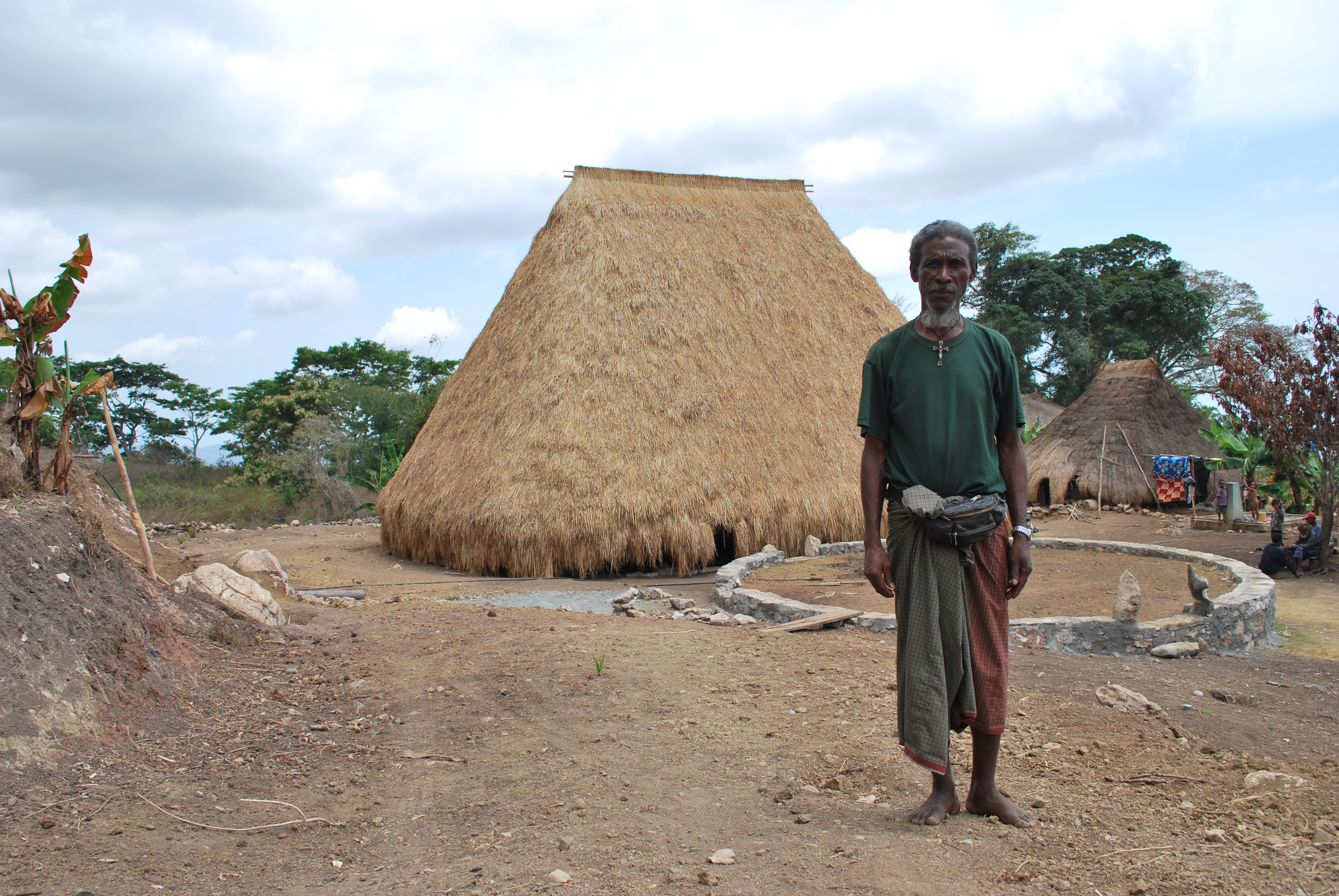 Mann in Fatuc Laran, Lactos, Cova Lima, Osttimor